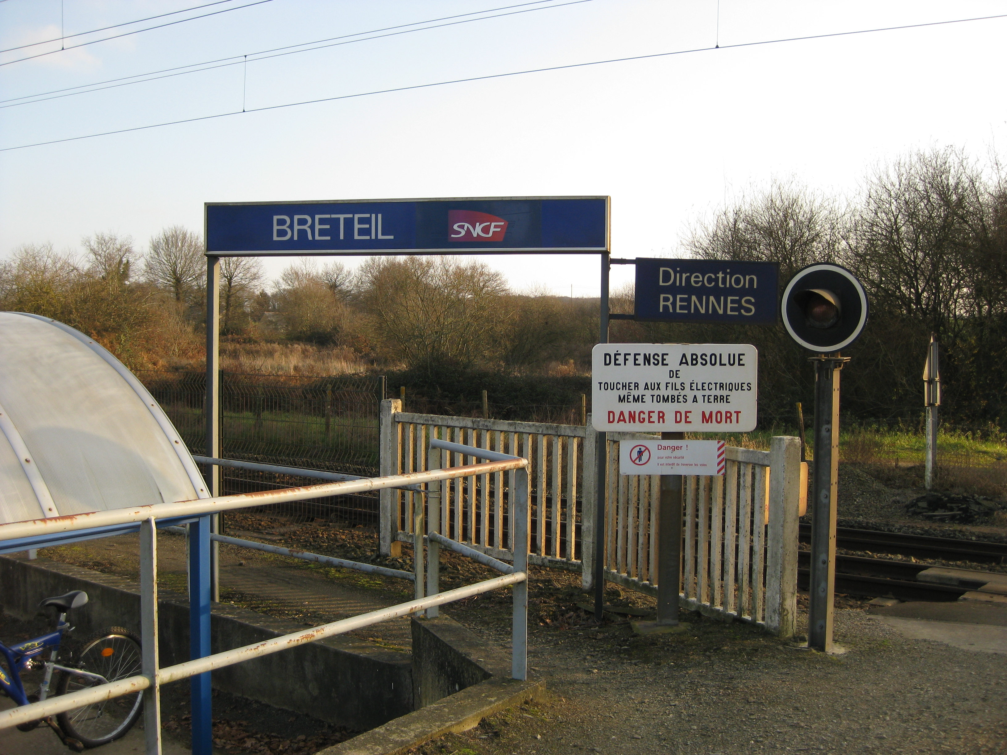 Entrée de la gare de Breteil, direction Rennes